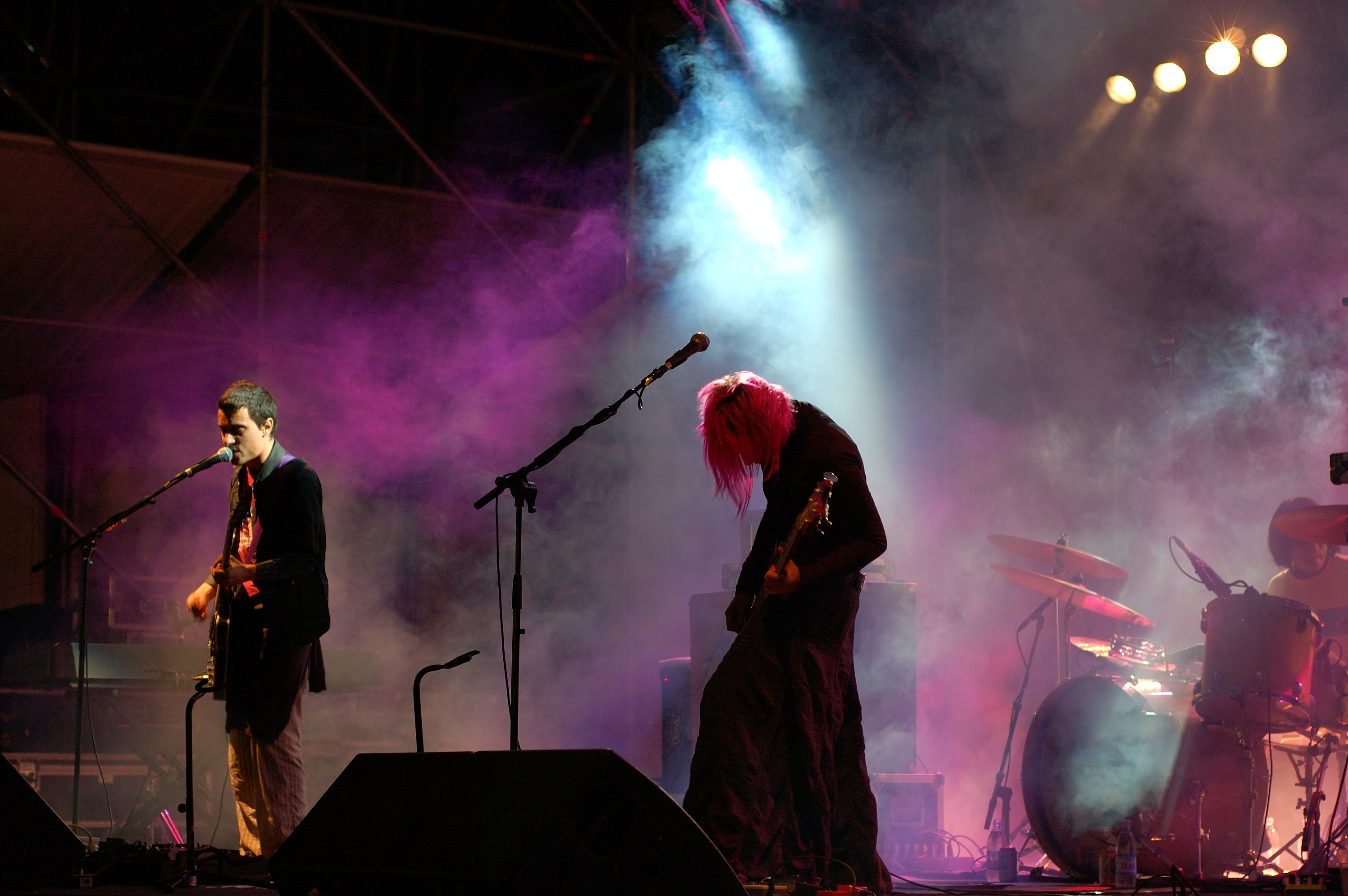 I Verdena alla Festa de L'Unità a Modena il 19 settembre 2007.